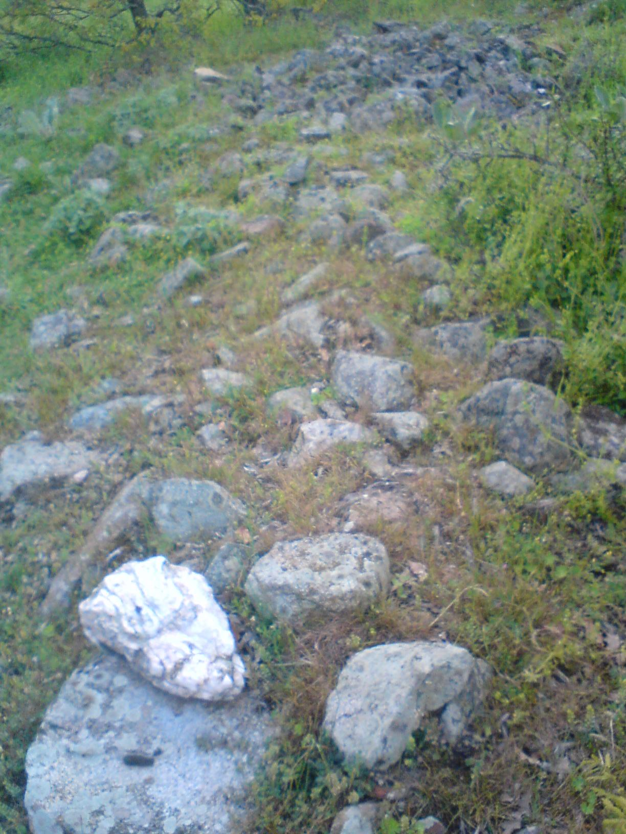 Археолошкиот локалитет Градиште во демирхисарско Граиште